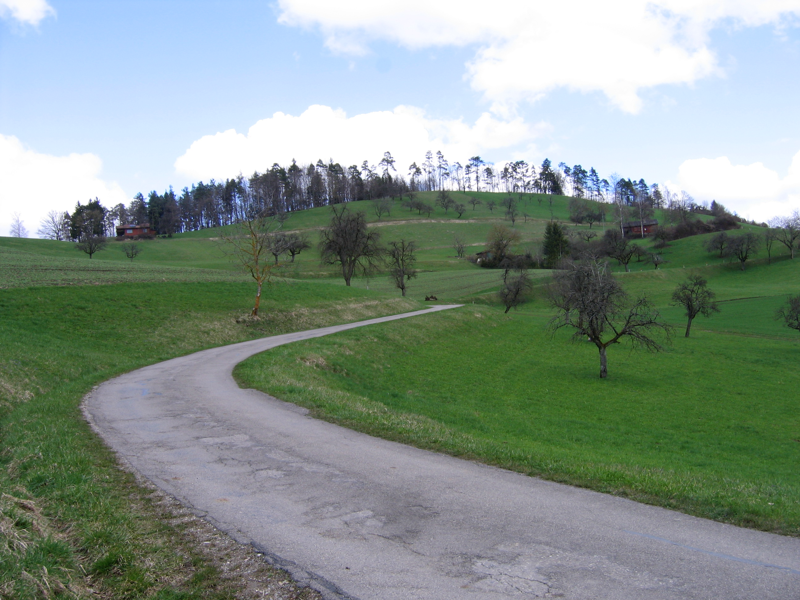 Der Staufenberg oberhalb Schleitheims (CH).